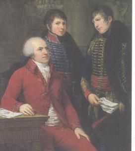 Portrait de Claude-Louis Petiet (1778-1850) et ses deux fils, par Andréa Appiani (1754-1817). (135.5 x 112 cm)